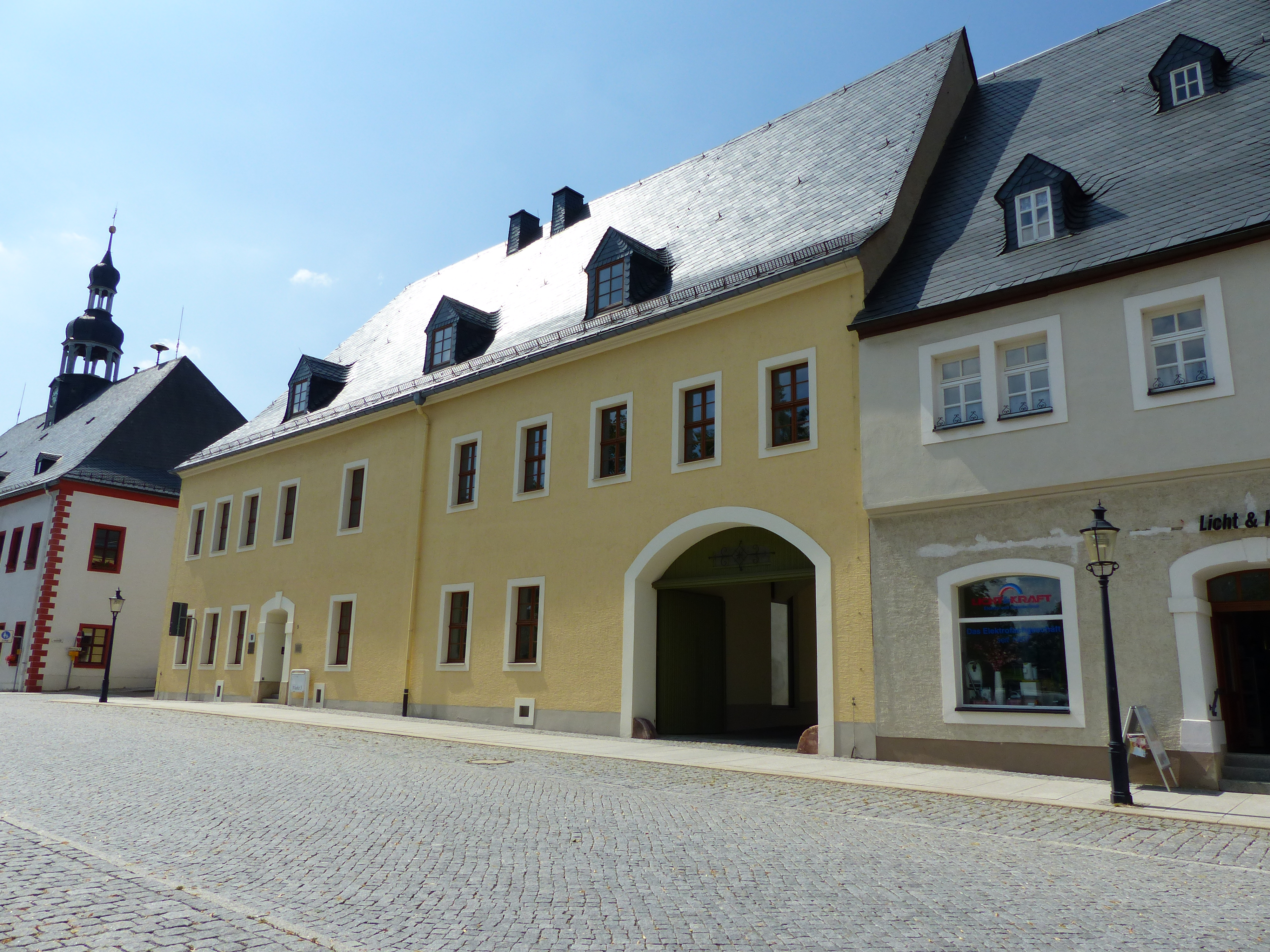 Denkmalgeschütztes Fürstenhaus, Markt 3, Marienberg, Sachsen